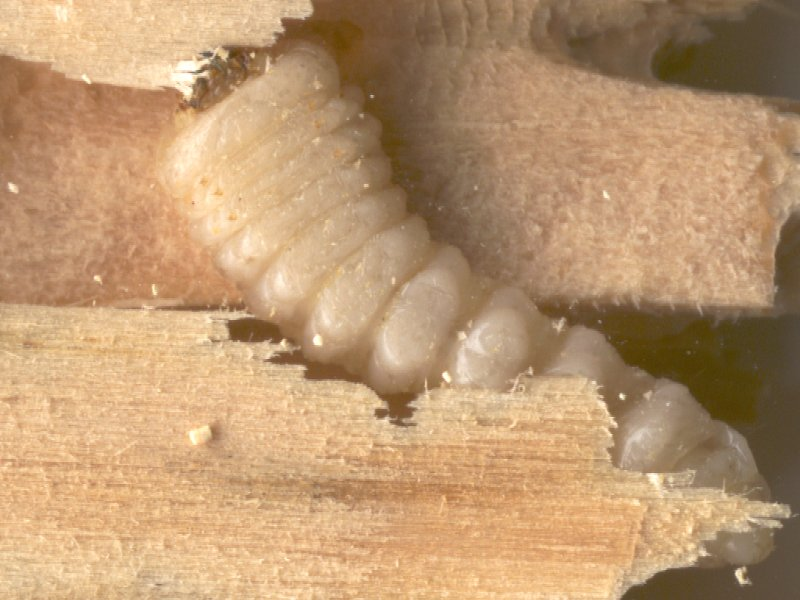 Hylotrupes bajulus - spuszczel pospolity na tle oczyszczonego z mączki drewnianej kawałka boazerii. Mieszkał u mnie w domu.